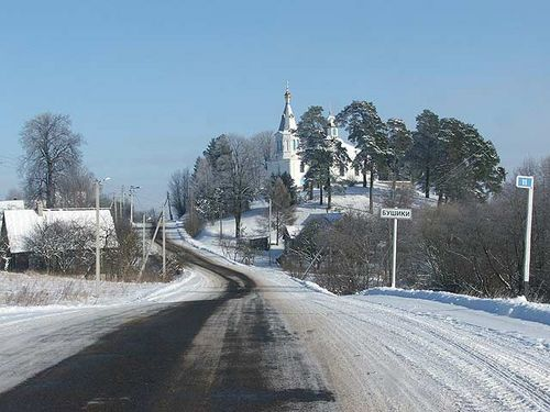 Бушыкі